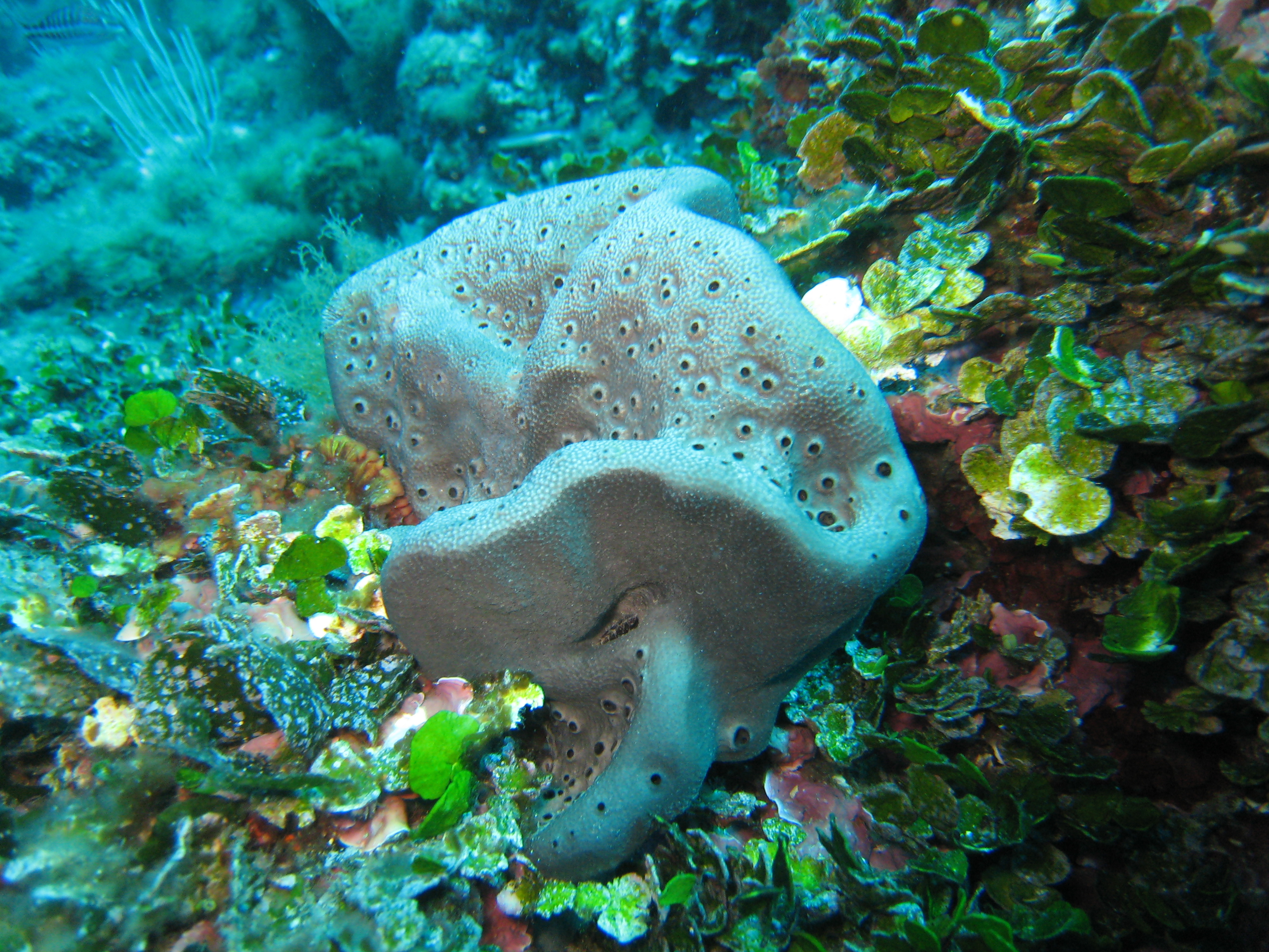 Éponge oreille d'éléphant de Méditerranée (Spongia lamella) près de La Ciota